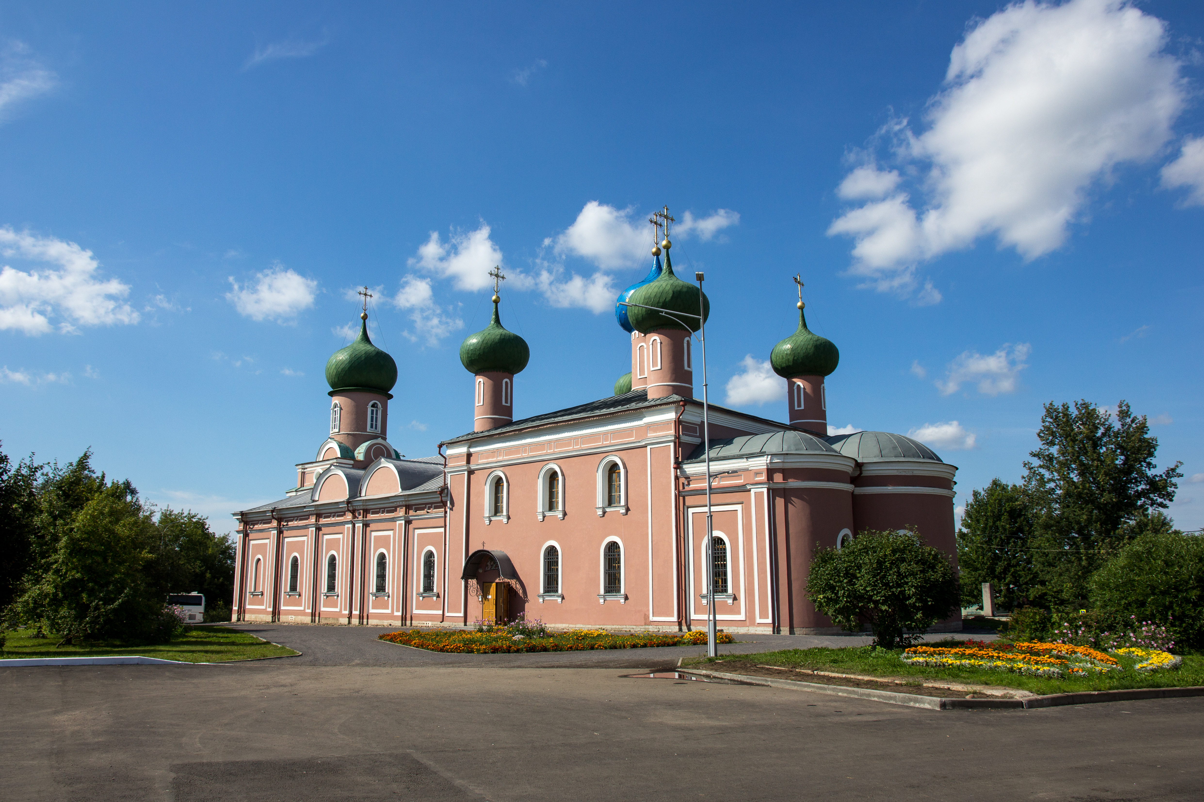 Тихвин. Кафедральный собор Спаса Преображения.